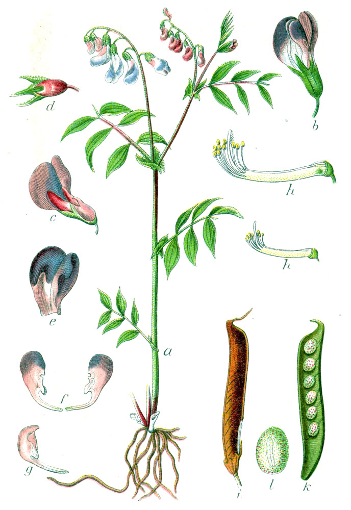 Lathyrus vernus (L.) Bernh. subsp. vernus, syn. Pisum vernum (L.) E.H.L.Krause Original Description Frühlings-Walderbse, Pisum vernum